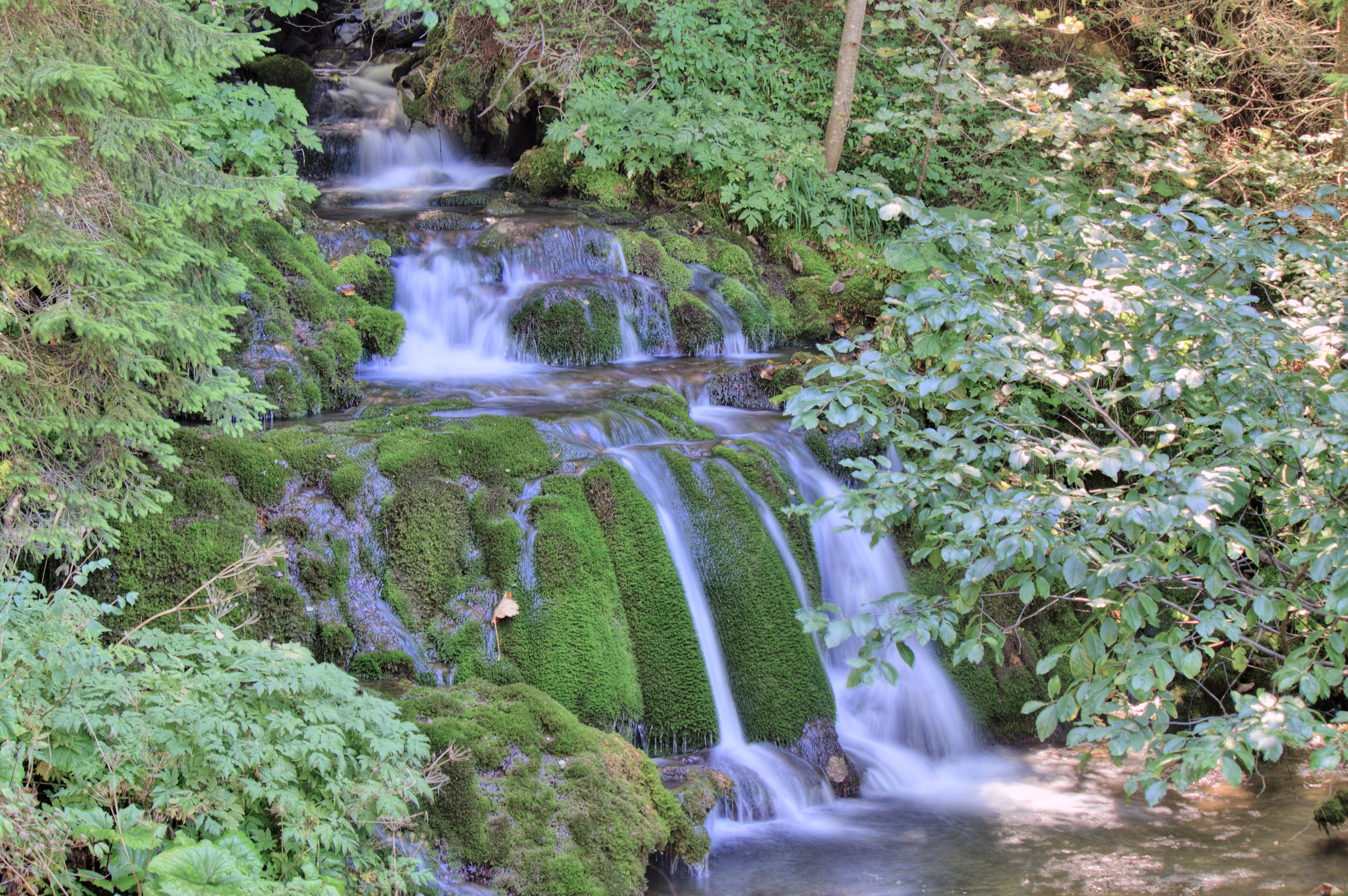 ID је: PZPP015